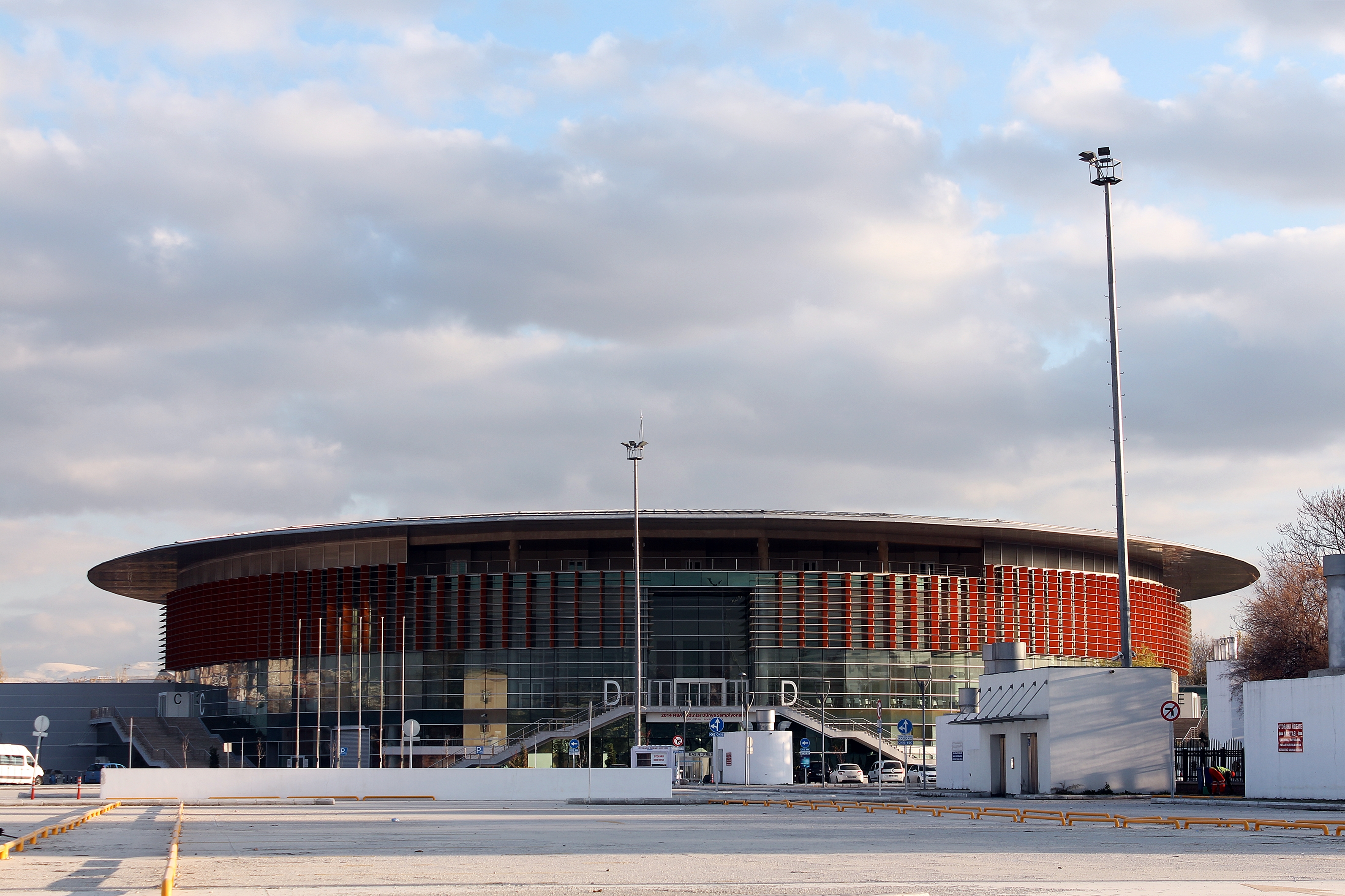 Ankara Arena Genel Görünüm